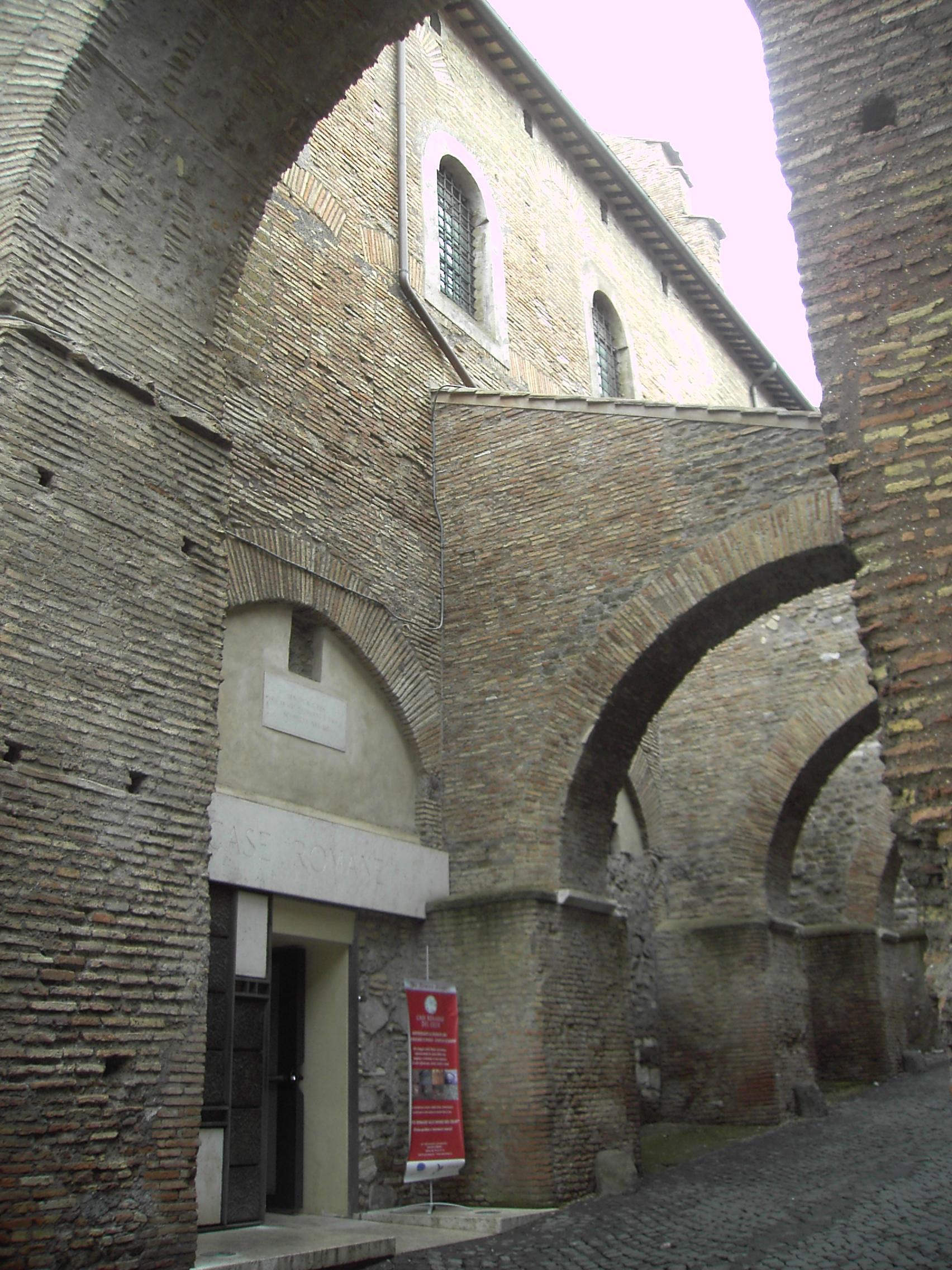 Roma, Basilica dei santi Giovanni e Paolo - ingresso alla casa romana.